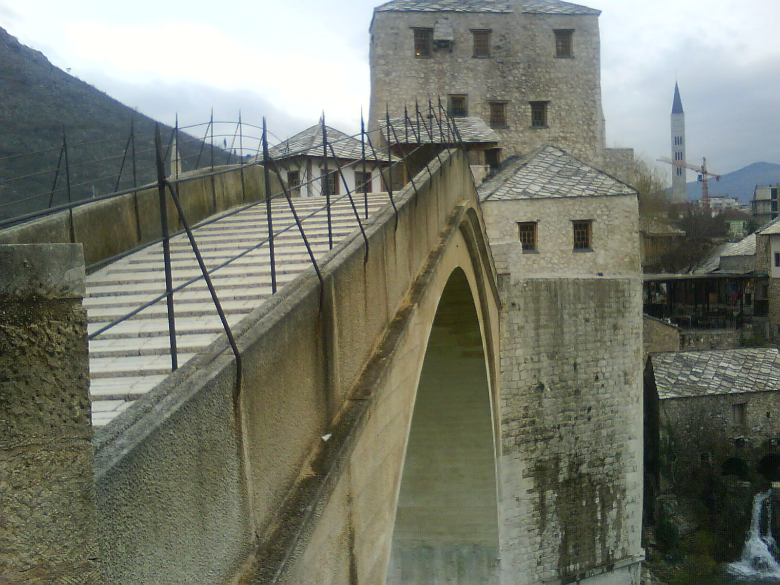 Stari Most gledan sa jugozapada